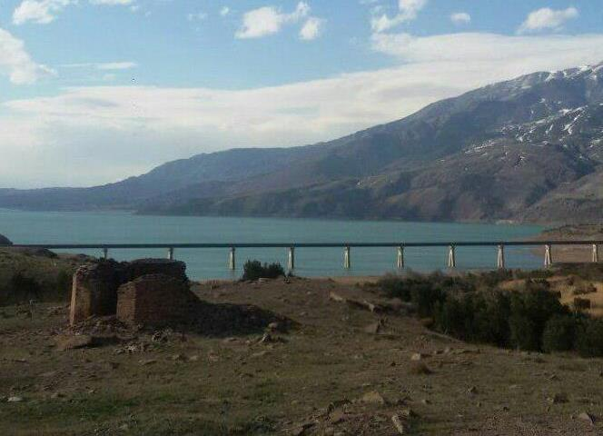 تصویری از بقایای گنبد شریف منجیلی( دلیرر گنبد ) دلی گنبز در منجیل